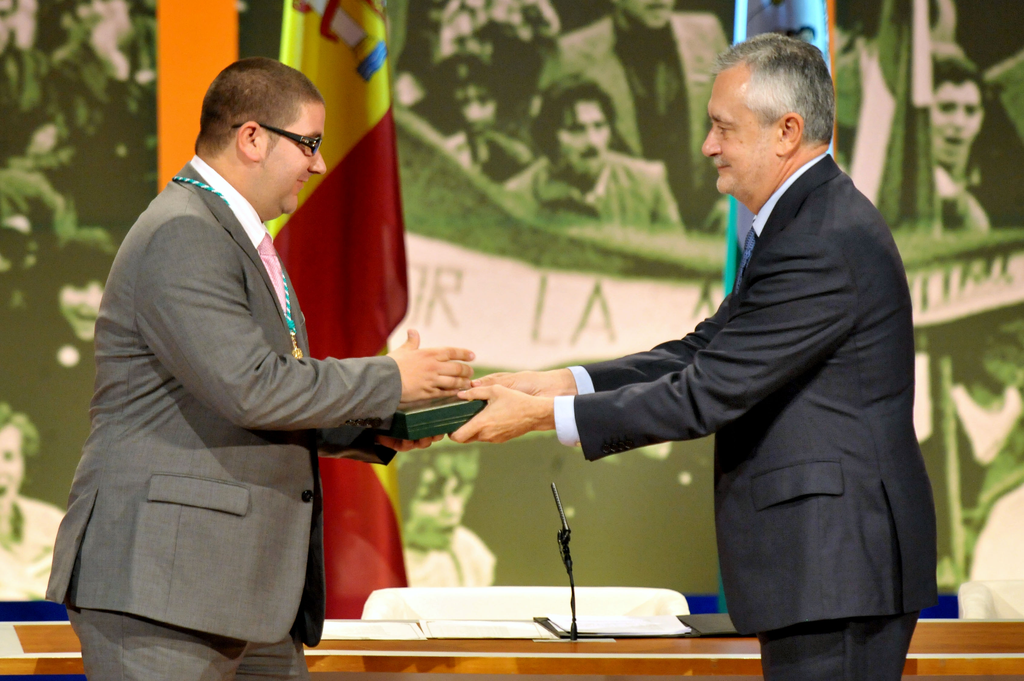 El cocinero Dani García es condecorado con la Medalla de Andalucía en presencia del presidente de la Junta, José Antonio Griñán.